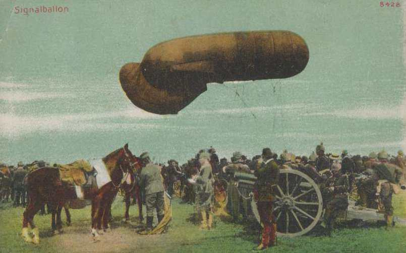 Signalballon im 1. Weltkrieg